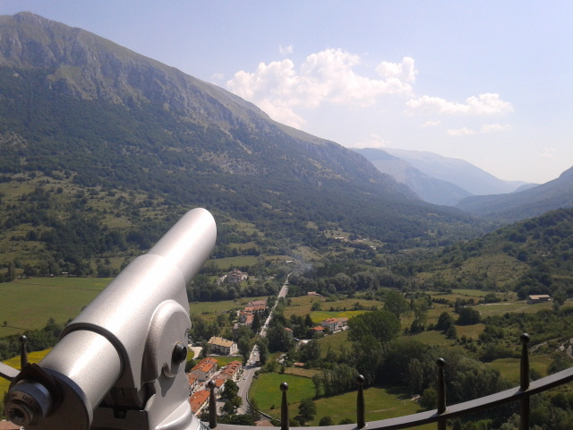 Belvedere di Opi